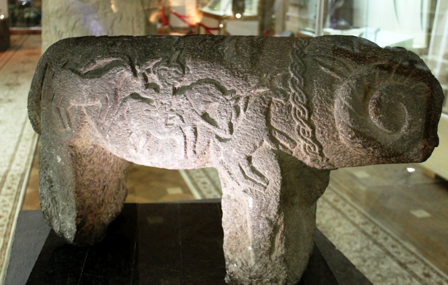 Каменная фигура животного